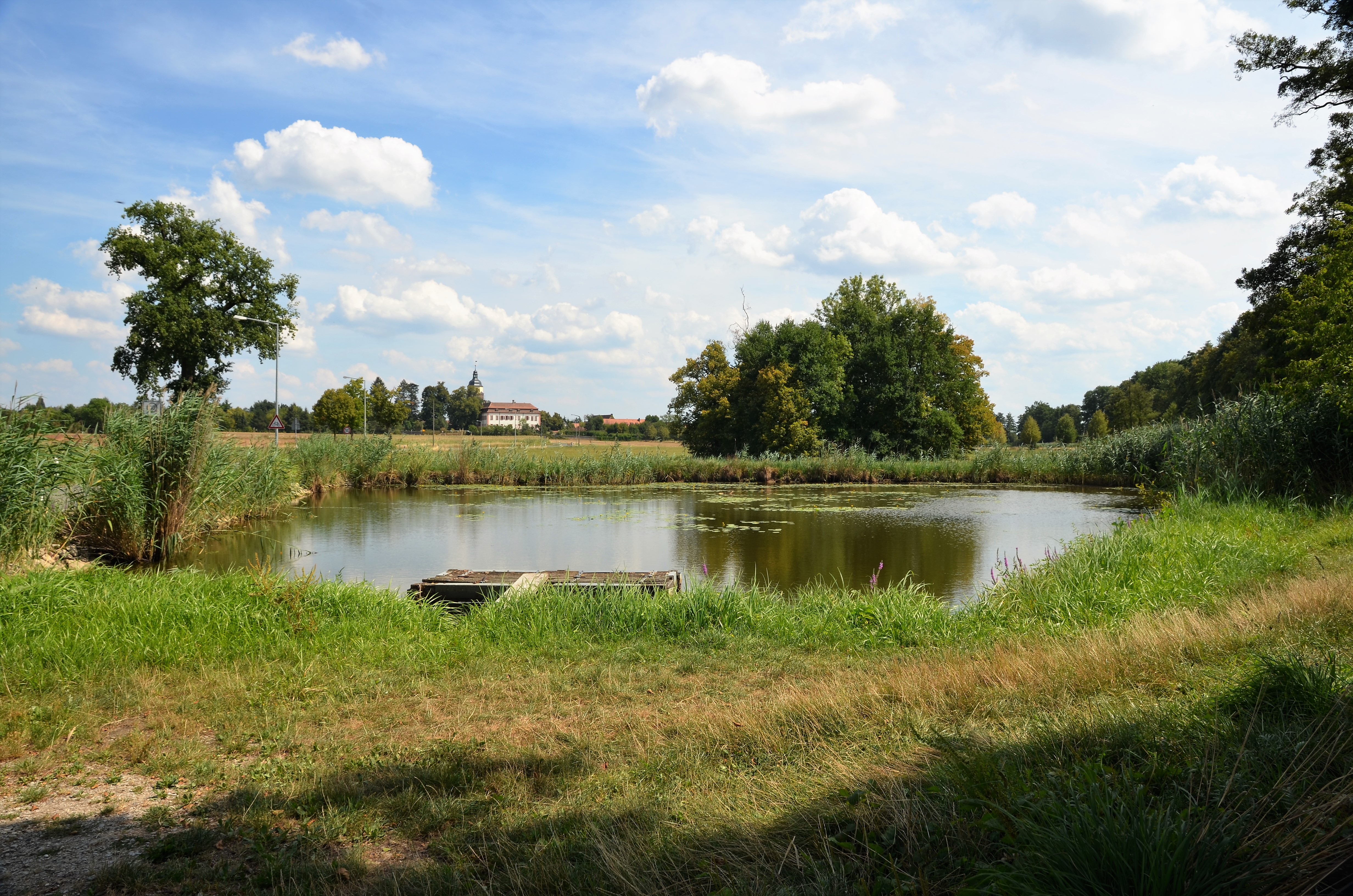 Blick über den Mühlweiher in Kleingründlach auf das Schloss und die Kirche Großgründlach